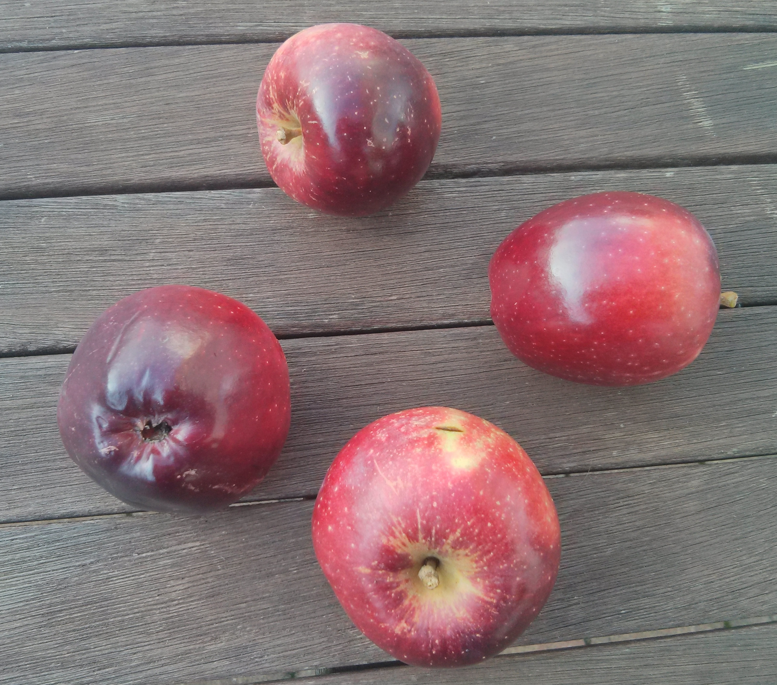 Apfel, Apfelsorte Spartan Gepflückt und gegessen in Mecklenburg-Vorpommern